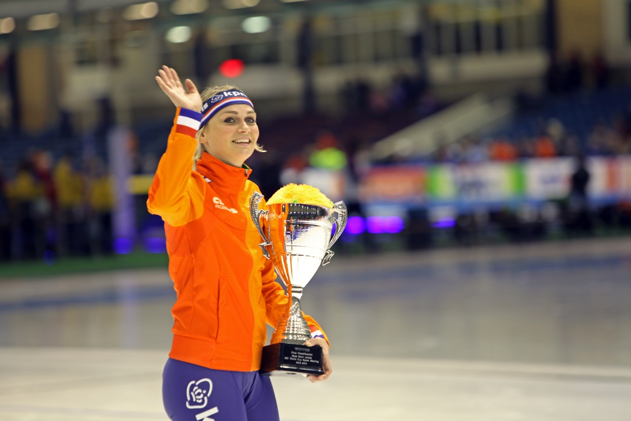 Irene Schouten, winnaar wereldbeker mass start in Thialf